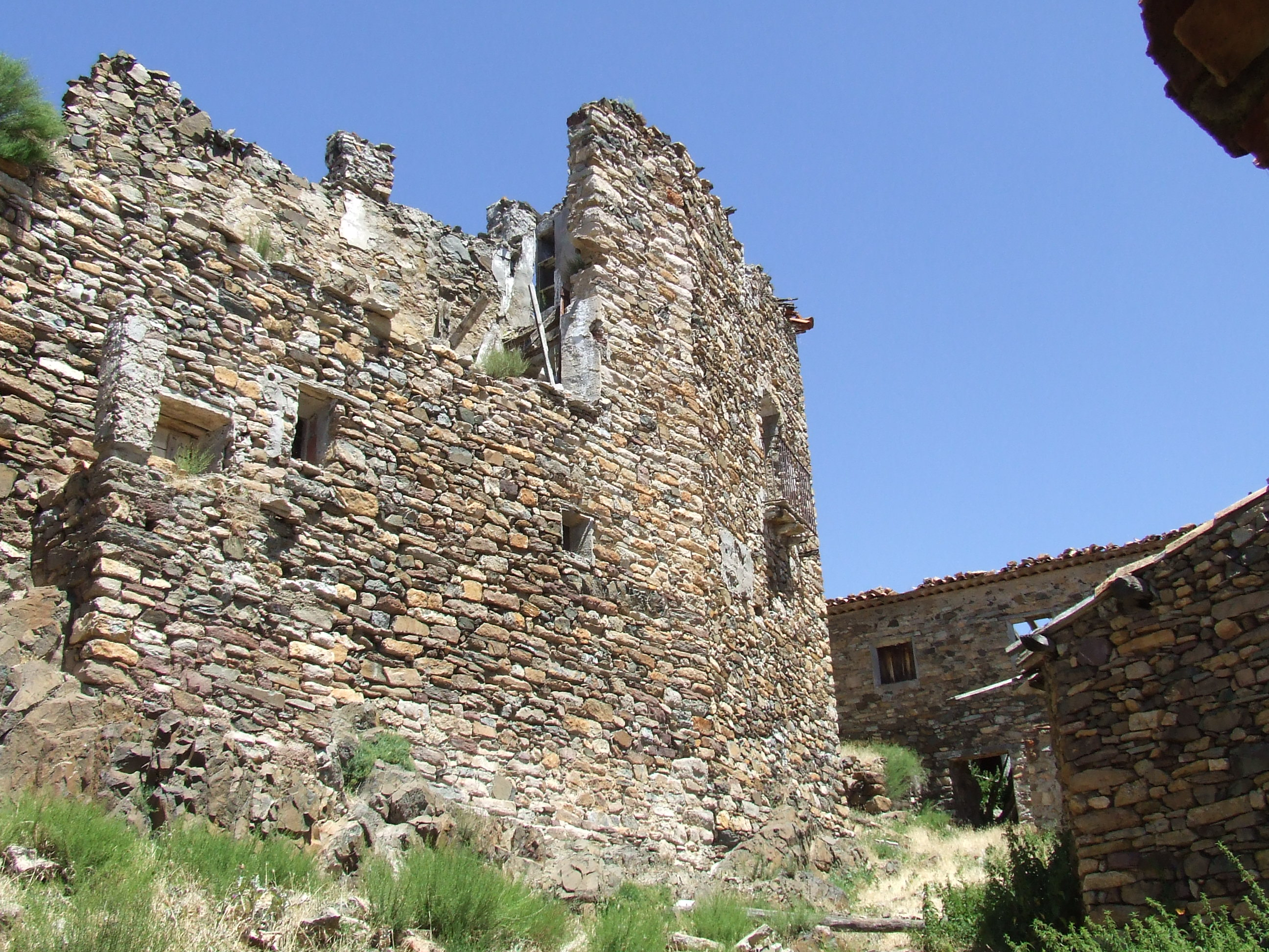 Restes del castell d'Erill (Erillcastell, Malpàs, el Pont de Suert, Alta Ribagorça)